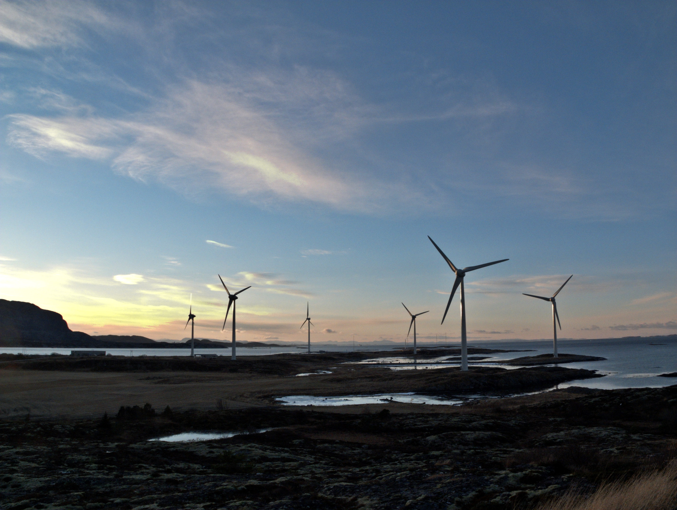 Valsneset vindmøllepark i desember 2012